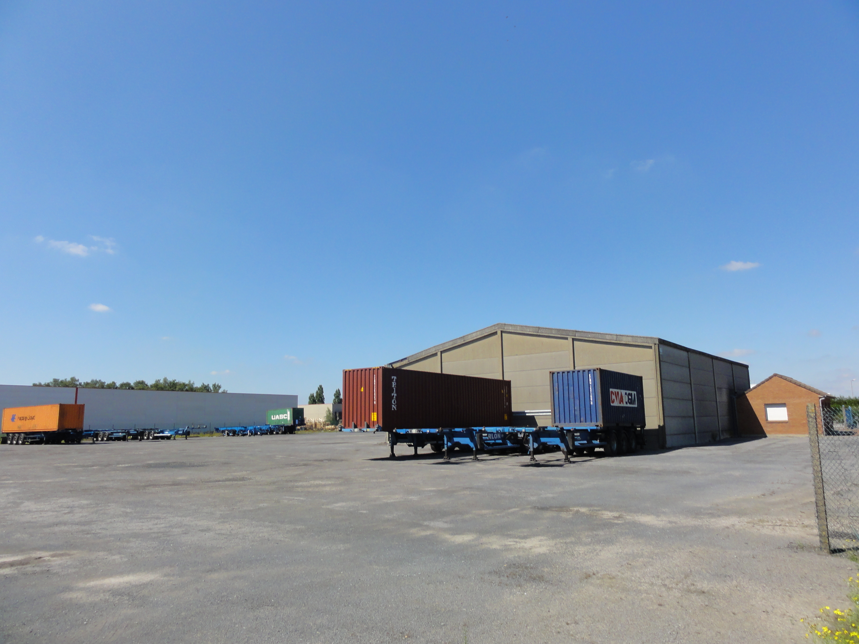 Terril n° 145 dit 7 de Courcelles, disparu, Fosse n° 7 - 7 bis de la Compagnie des mines de l'Escarpelle, Courcelles-lès-Lens, Pas-de-Calais, Nord-Pas-de-Calais, France.